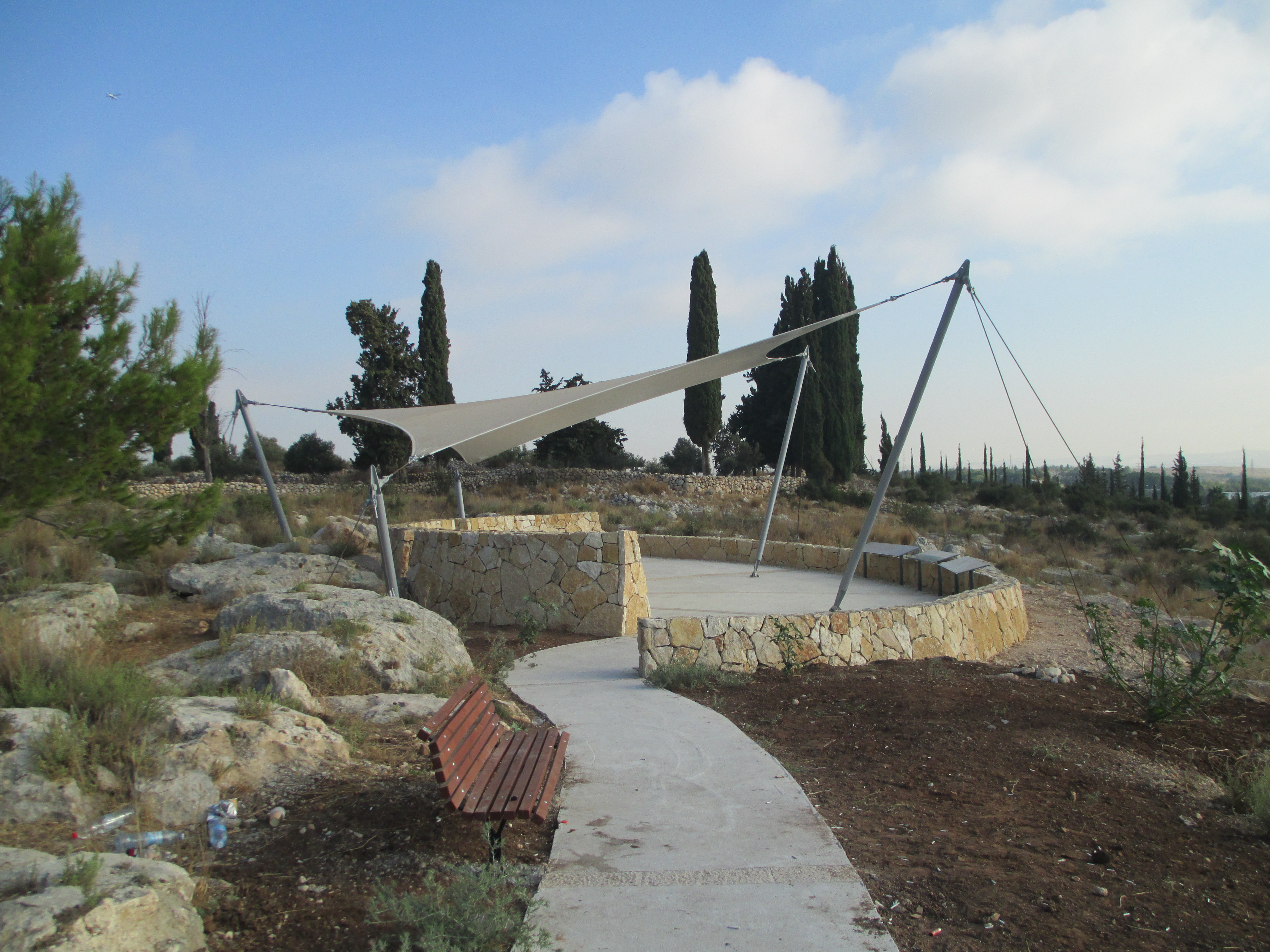 מצפור אמנון ליפקין שחק בגבעת הברושים במודיעין